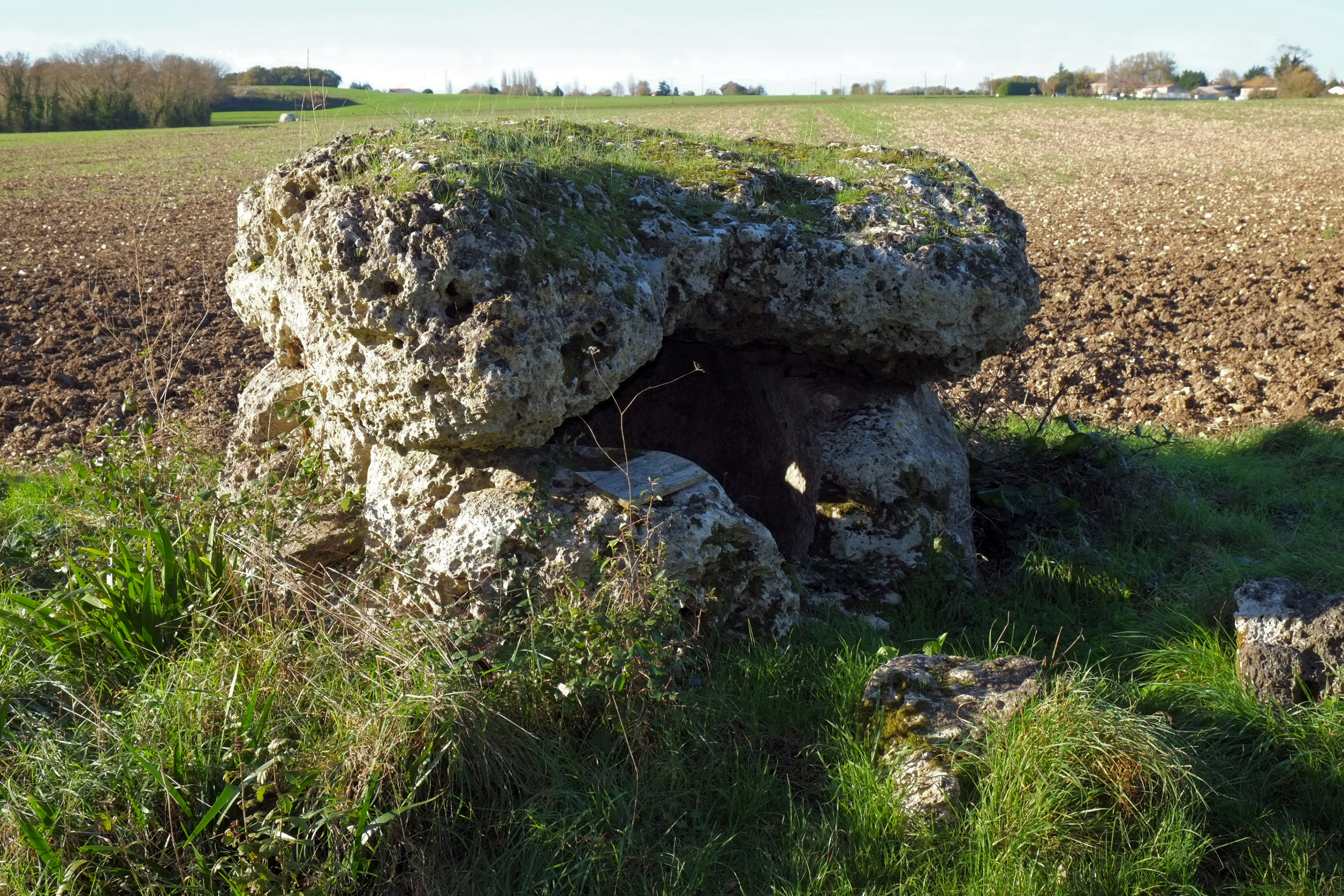 Pierres Closes de Charras, l'Houmée Saint-Laurent-de-la-Prée Charente-Maritime France